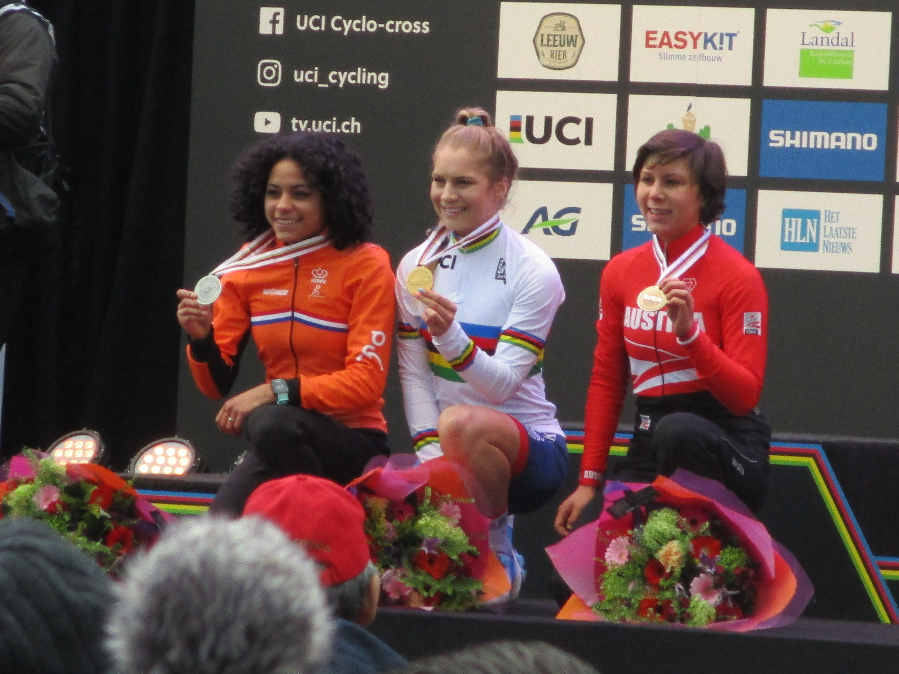 Wereldkampioenschappen Veldrijden op 3 en 4 februari 2018 op de Cauberg in Valkenburg, Limburg, Nederland. Podium van de vrouwen beloften: 1. Evie Richards 2. Ceylin del Carmen Alvarado 3. Nadja Heigl